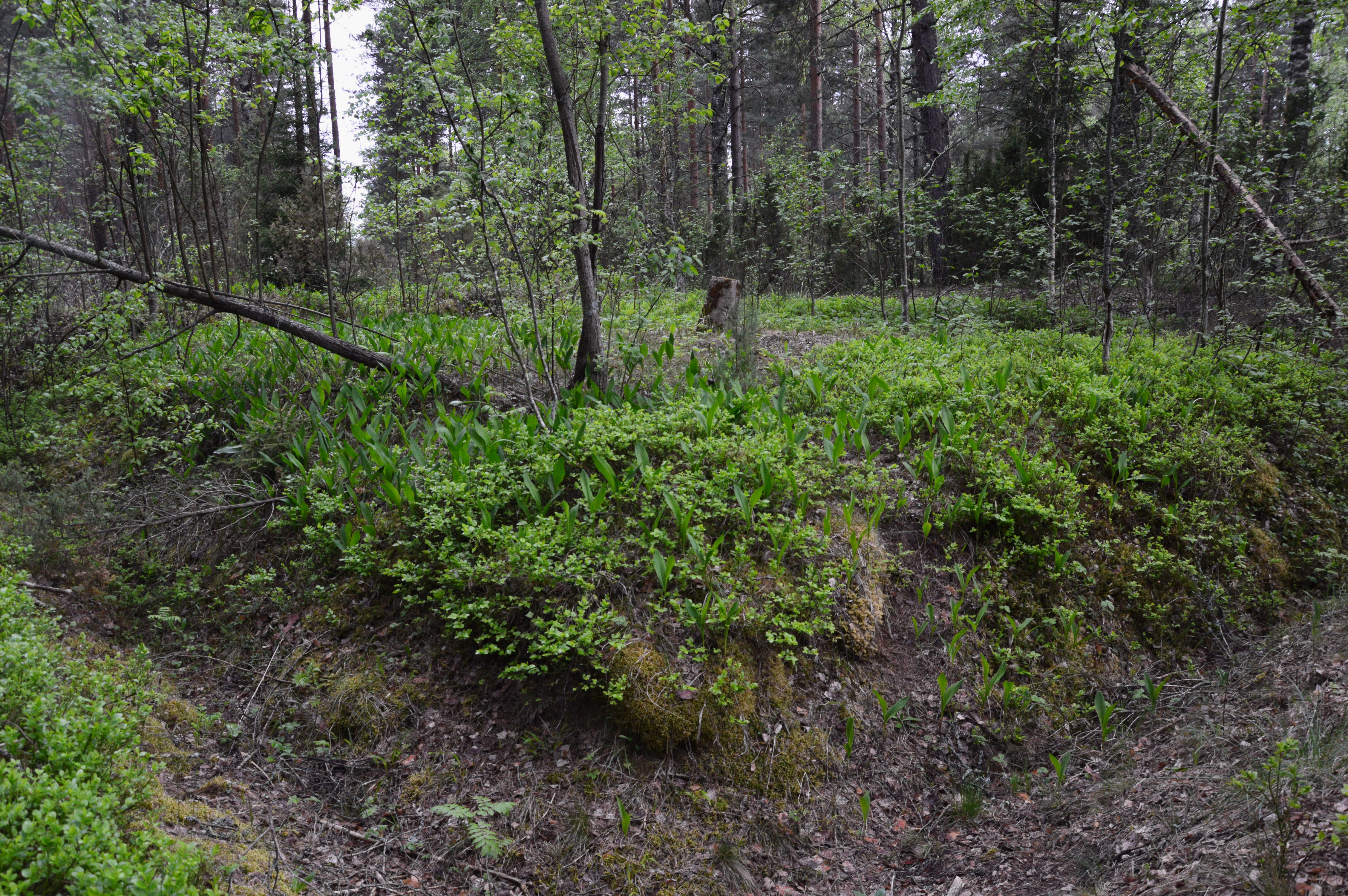 Mustoja maastikukaitseala. Tornimägi.